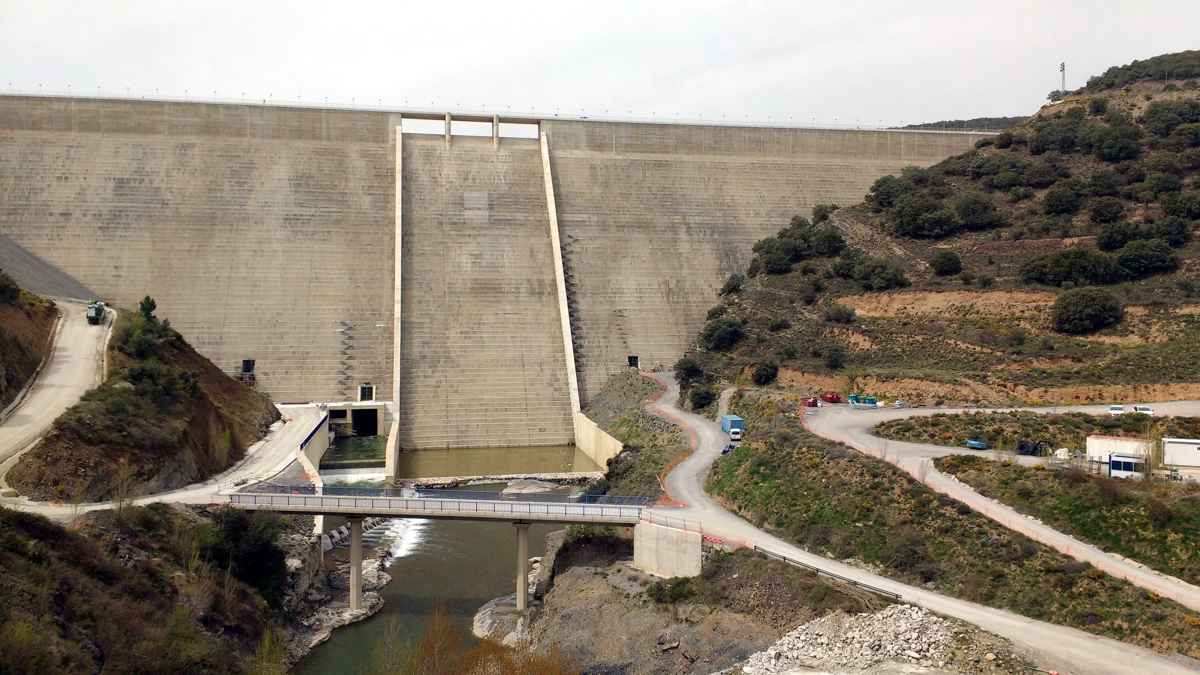 Detalle del muro de la Presa de Enciso, vista desde el carrascal, meses después de la terminación del muro.